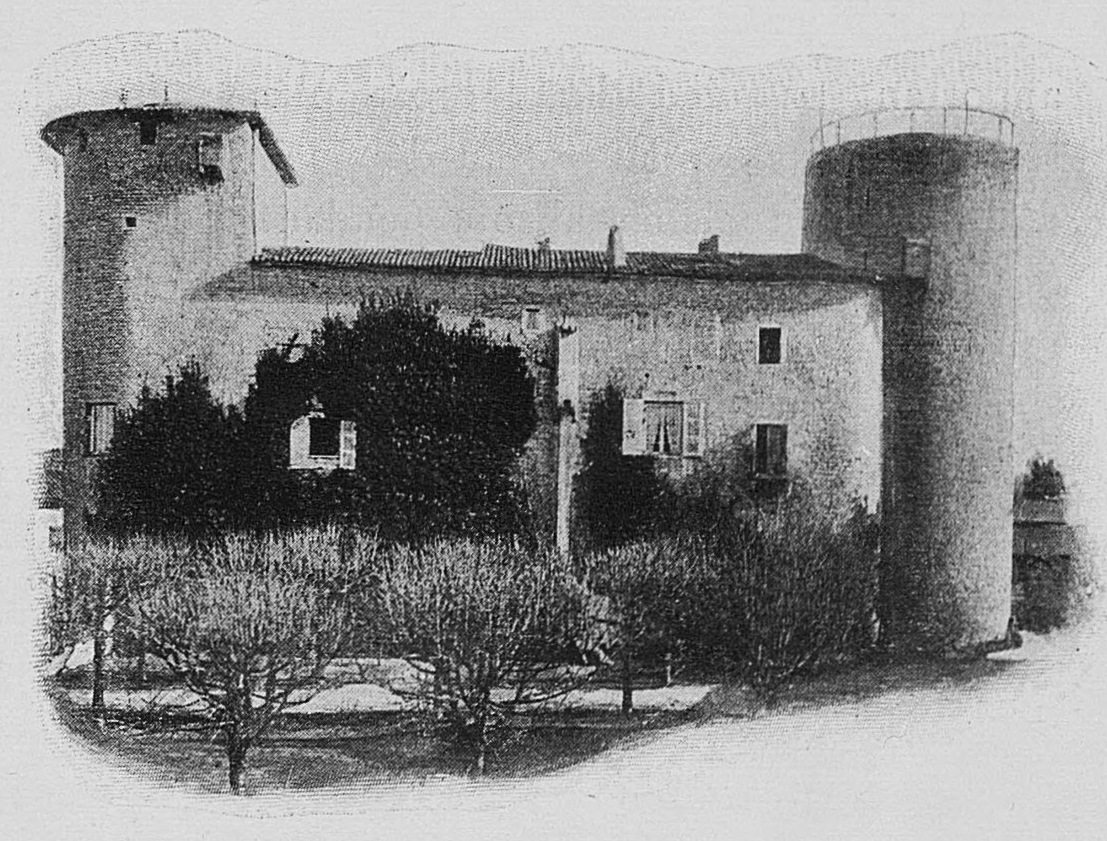 Dictionnaire illustré des communes du département du Rhône. Tome 1 / par MM. E. de Rolland et D. Clouzet.